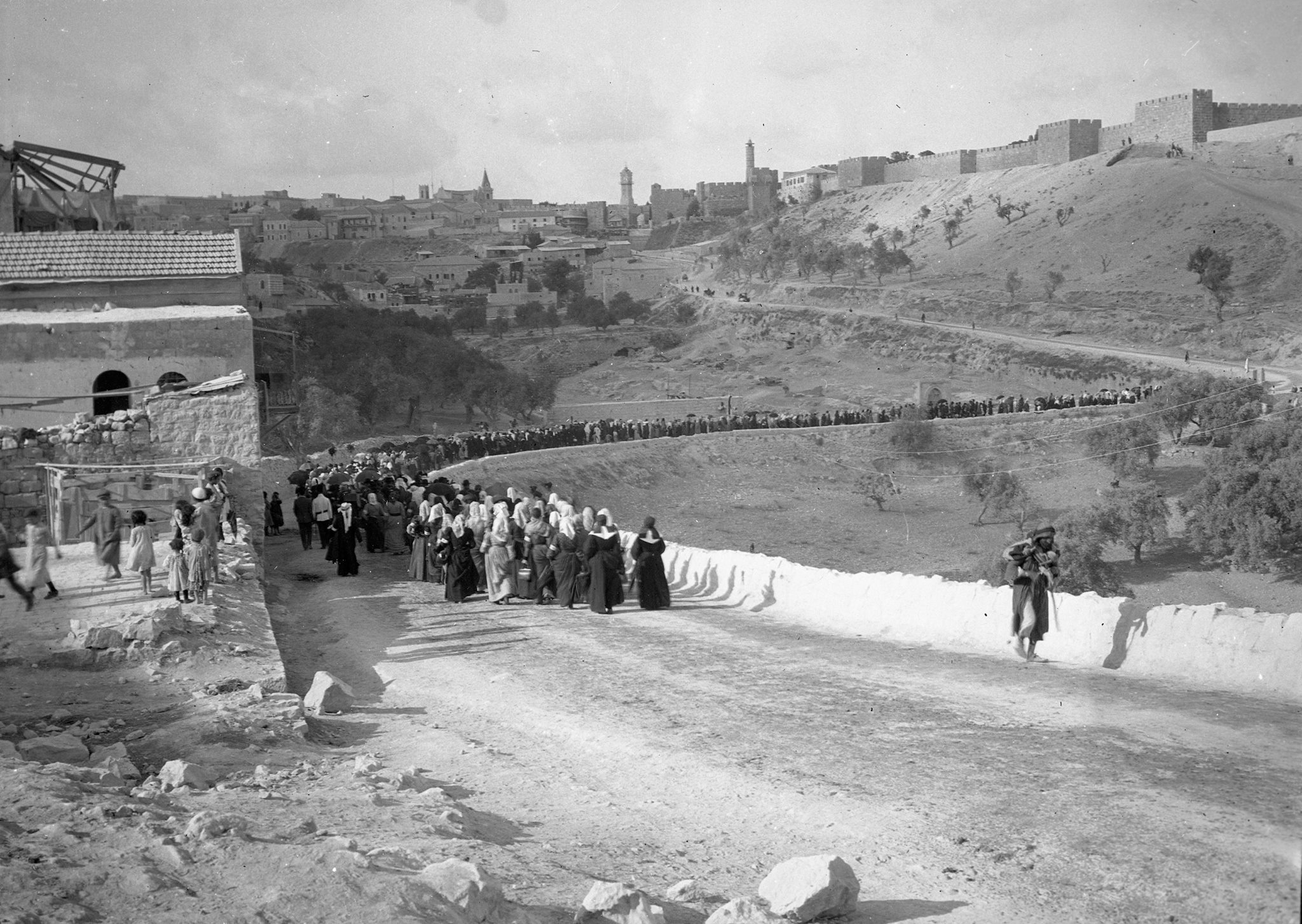 Jeruzalem - Fotografija romarjev iz leta 1910.